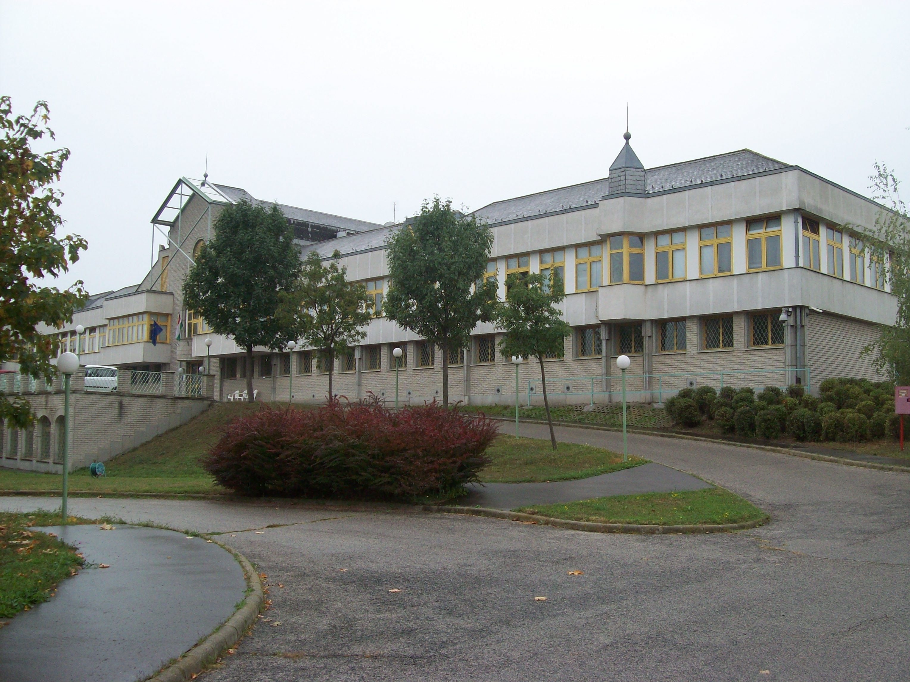 A Magyar Országos Levéltár lángliliom utcai épülete Óbudán (Budapest)